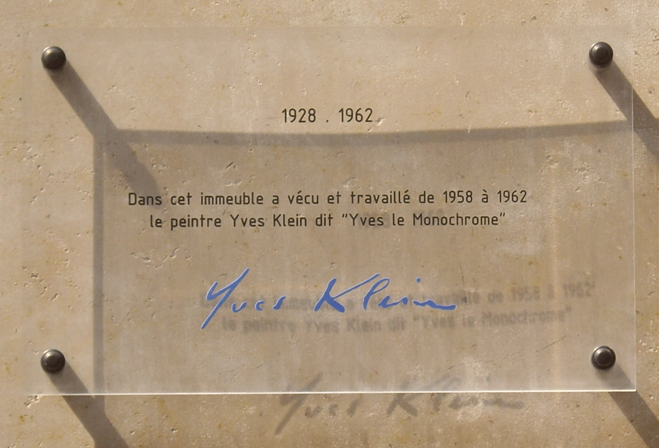 Plaque commémorative, 14 rue Campagne-Première, Paris 14e. « Dans cet immeuble a vécu et travaillé de 1958 à 1962 le peintre Yves Klein dit "Yves le Monochrome". »